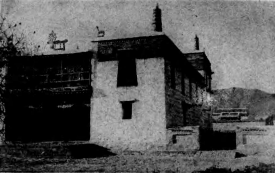 葛根廟 徒歩旅行 体位向上 - 日本国際観光局満洲支部1940